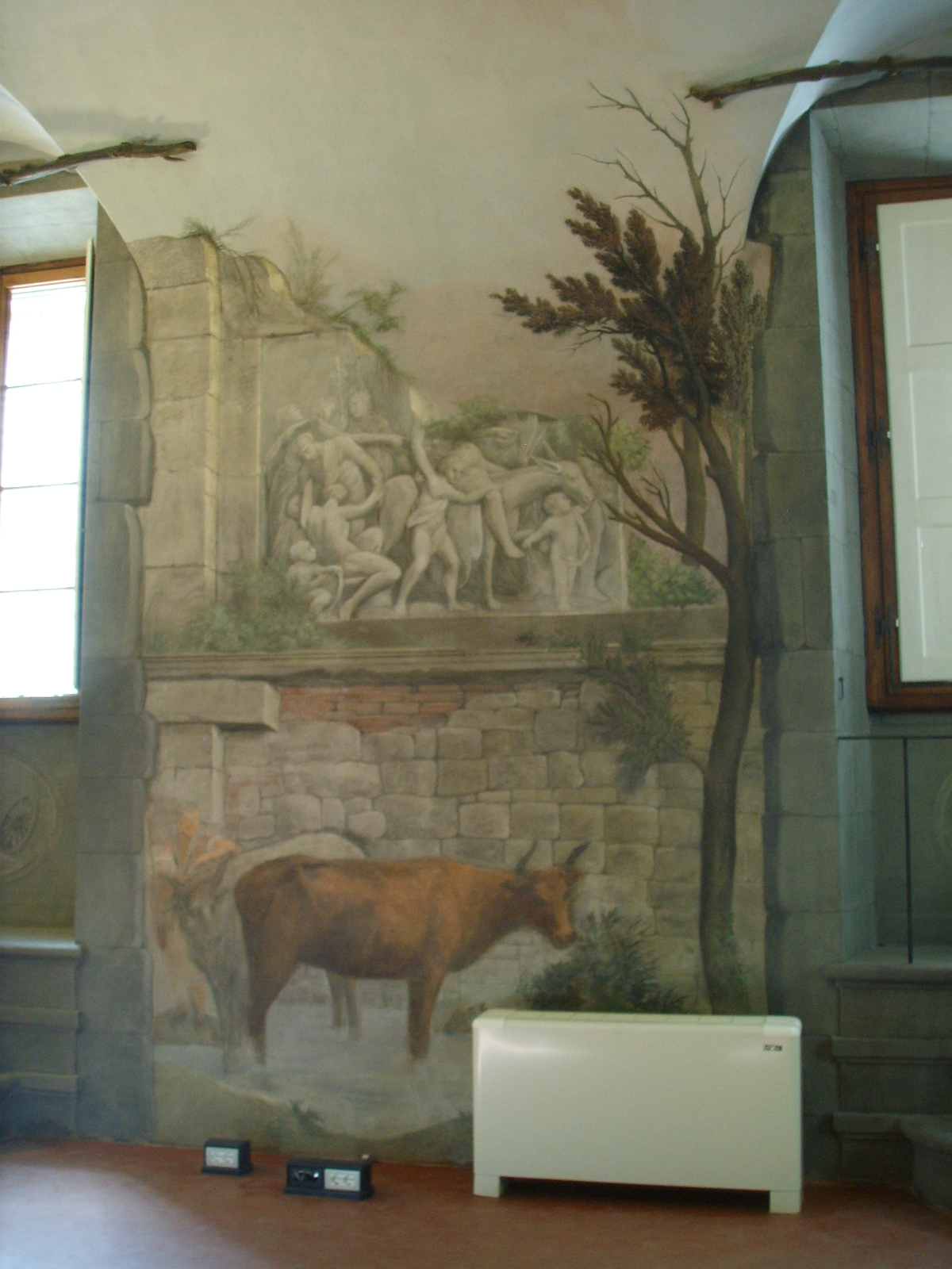 Palazzo sacrati, sala 6 06 Niccolò Contestabile